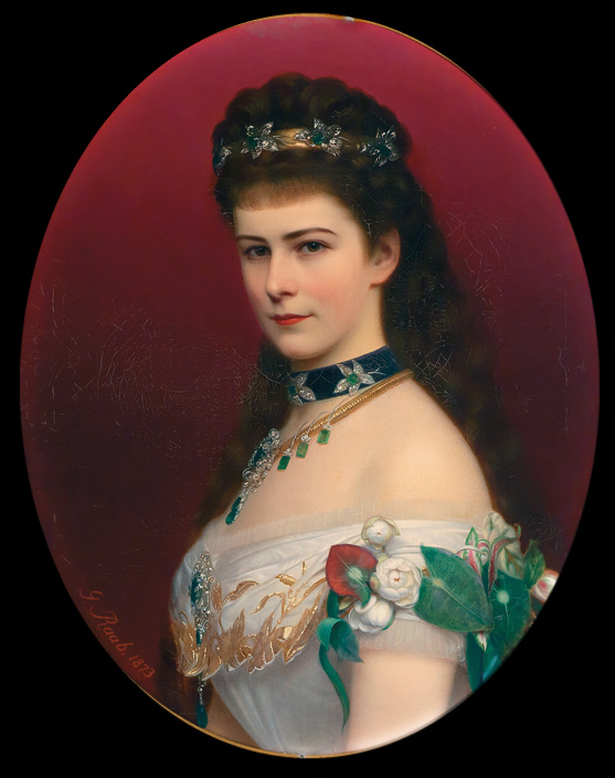 Porträt der Kaiserin